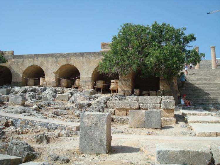 Acropole de Lindos (Rhodes), série de voûtes sous la Stoa (colonnade)